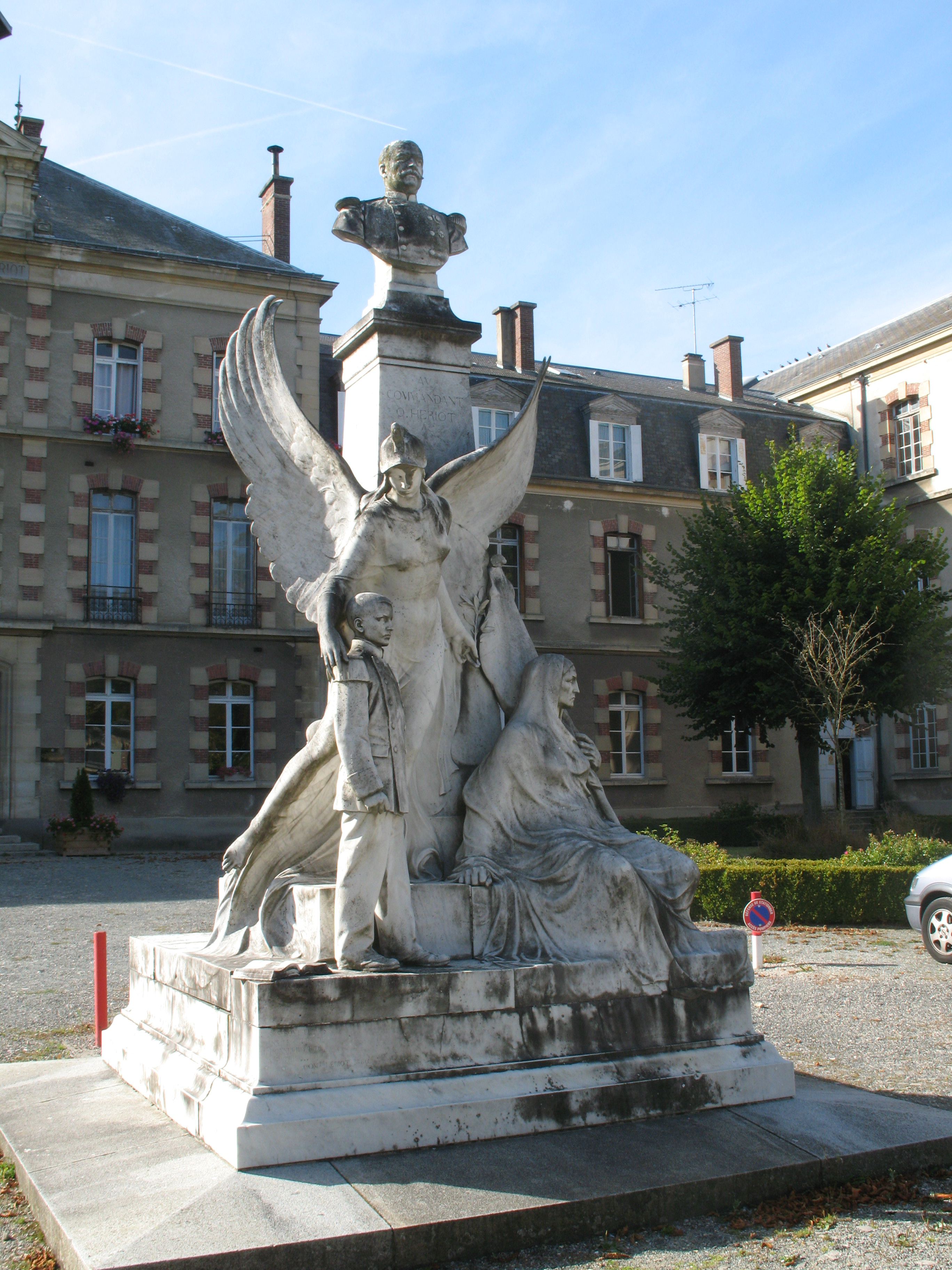 L'école Hériot à La Boissière-École dans les Yvelines.